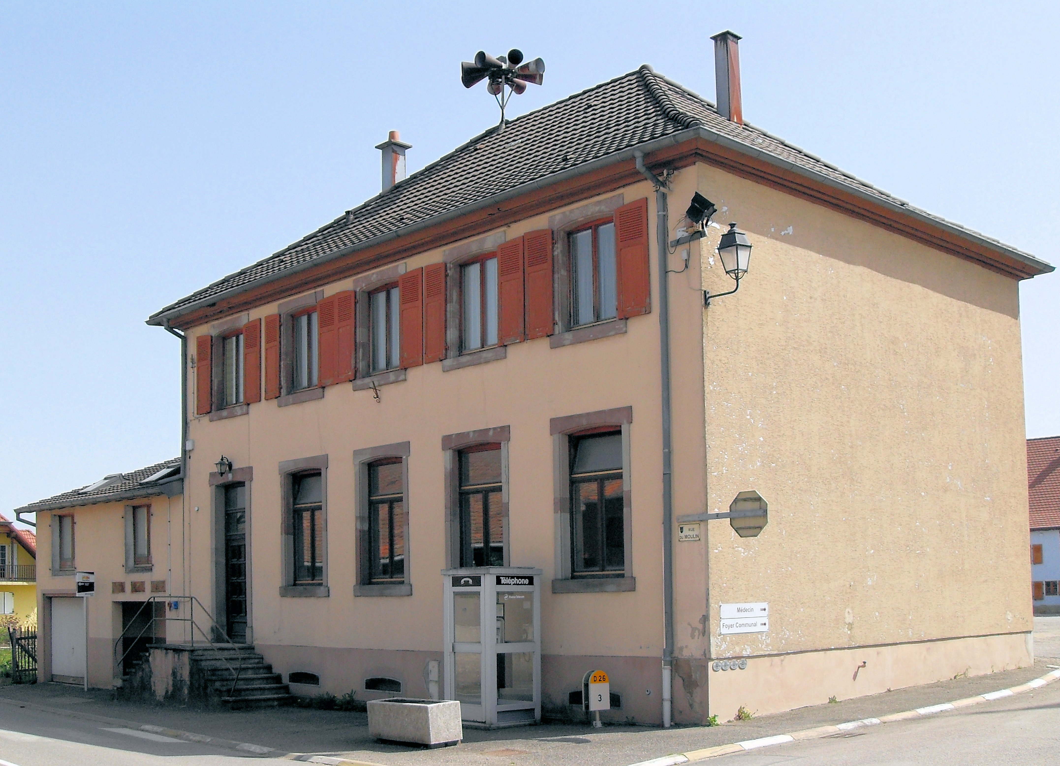 La mairie de Bréchaumont